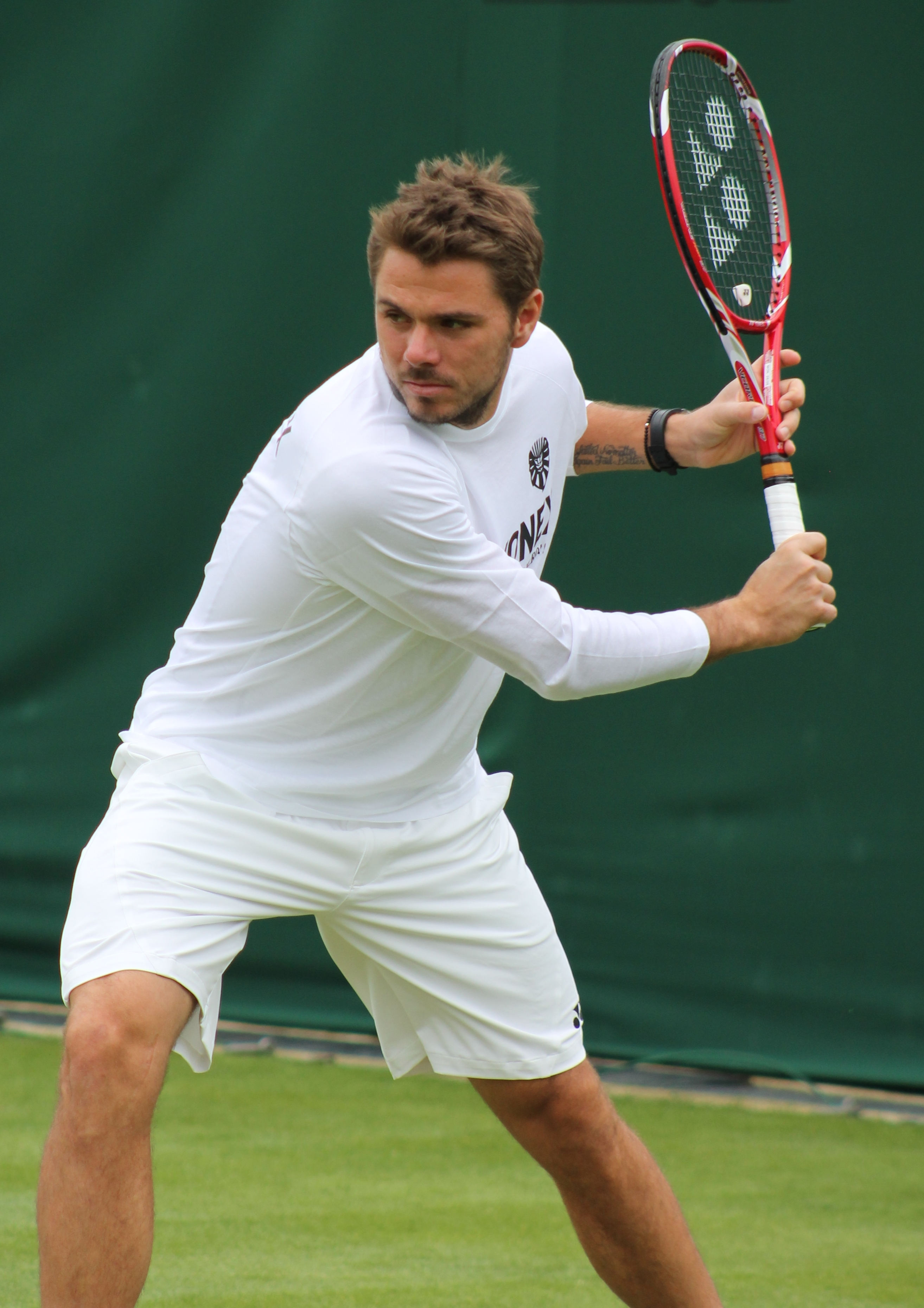 Emiliàn e rumagnòl: Stanislas Wawrinka tòlt śò durànt al turnèo ad Wimbledon dal 2013